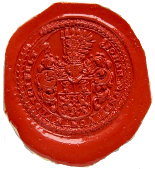 Jan Vilém Mundy, podnikatel v brněnském textilním průmyslu od r. 1780, majitel panství Drnovice, Hvozdec, Říčany, Tišnov a Veveří. Osobní pečeť z roku 1789.